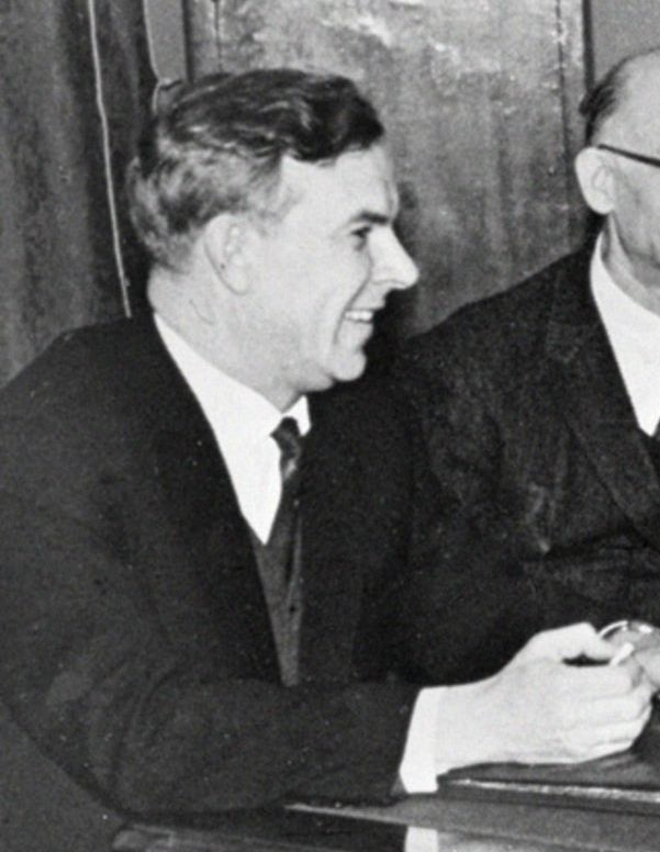 Владимир Семичастный, председатель КГБ СССР